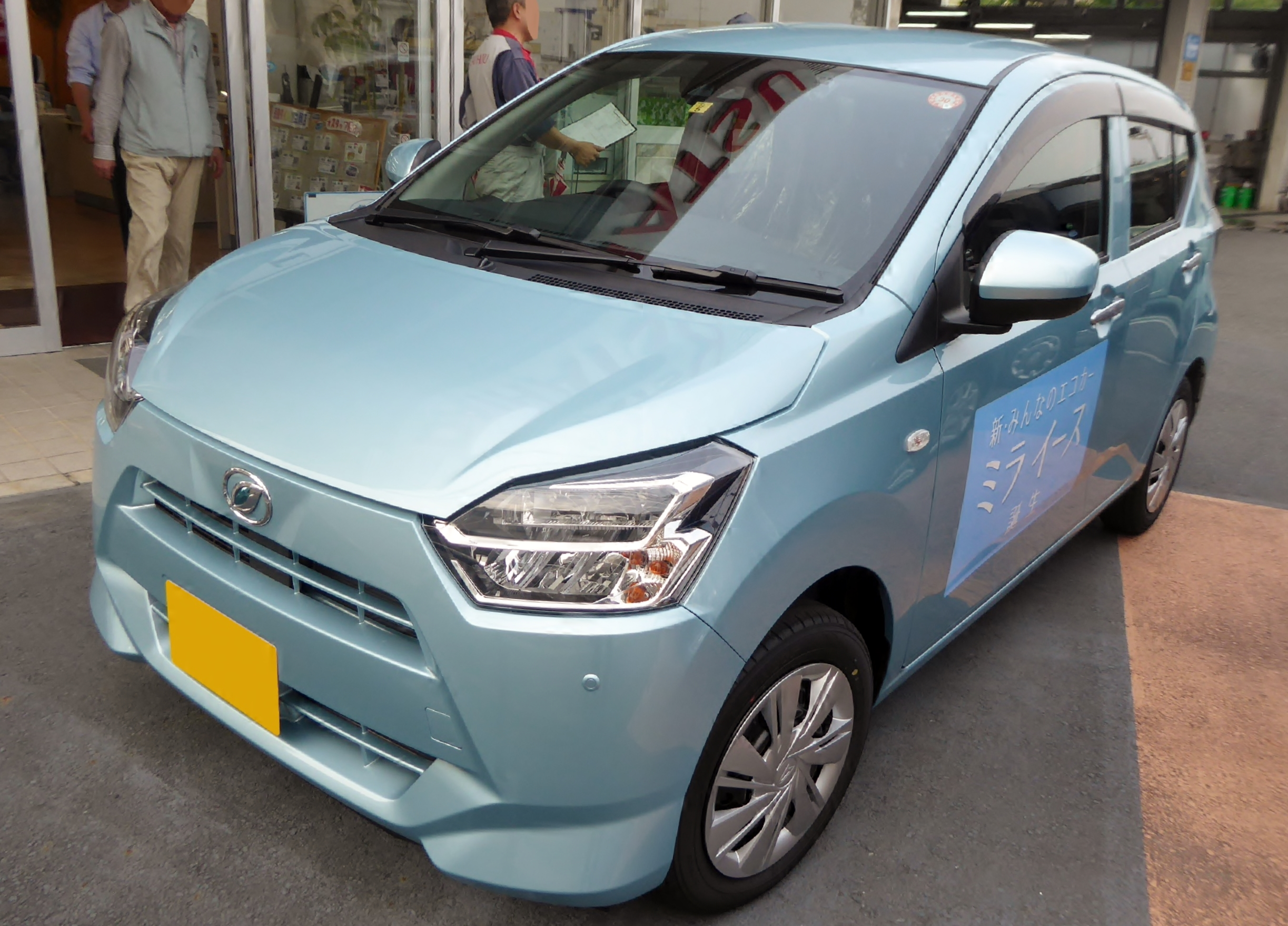 DBA-LA350S型ダイハツ・ミライースX"SA III"をフロントから撮影。